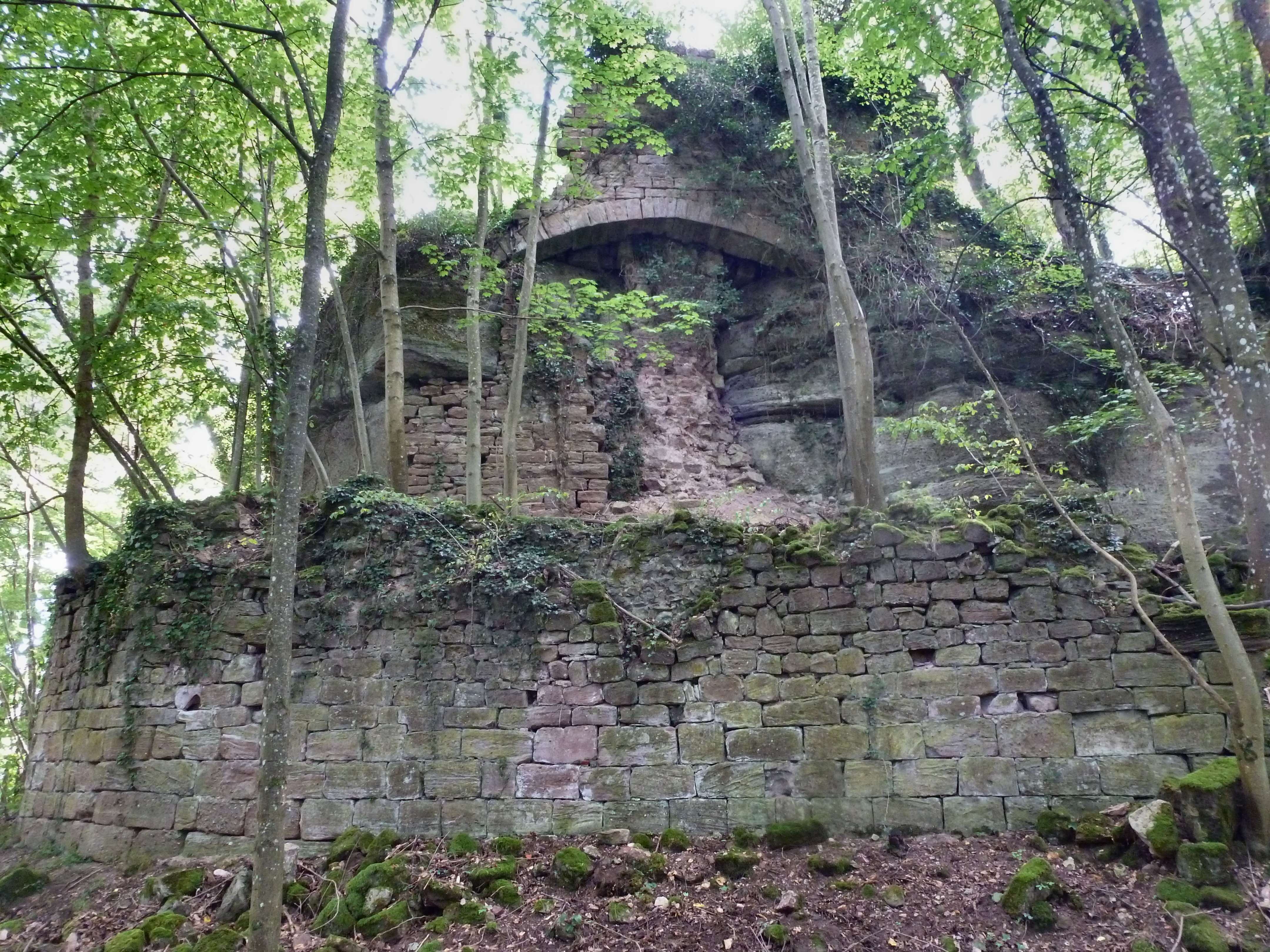 Ruines du château du Herrenstein à Neuwiller-lès-Saverne (Bas-Rhin, Alsace, France).